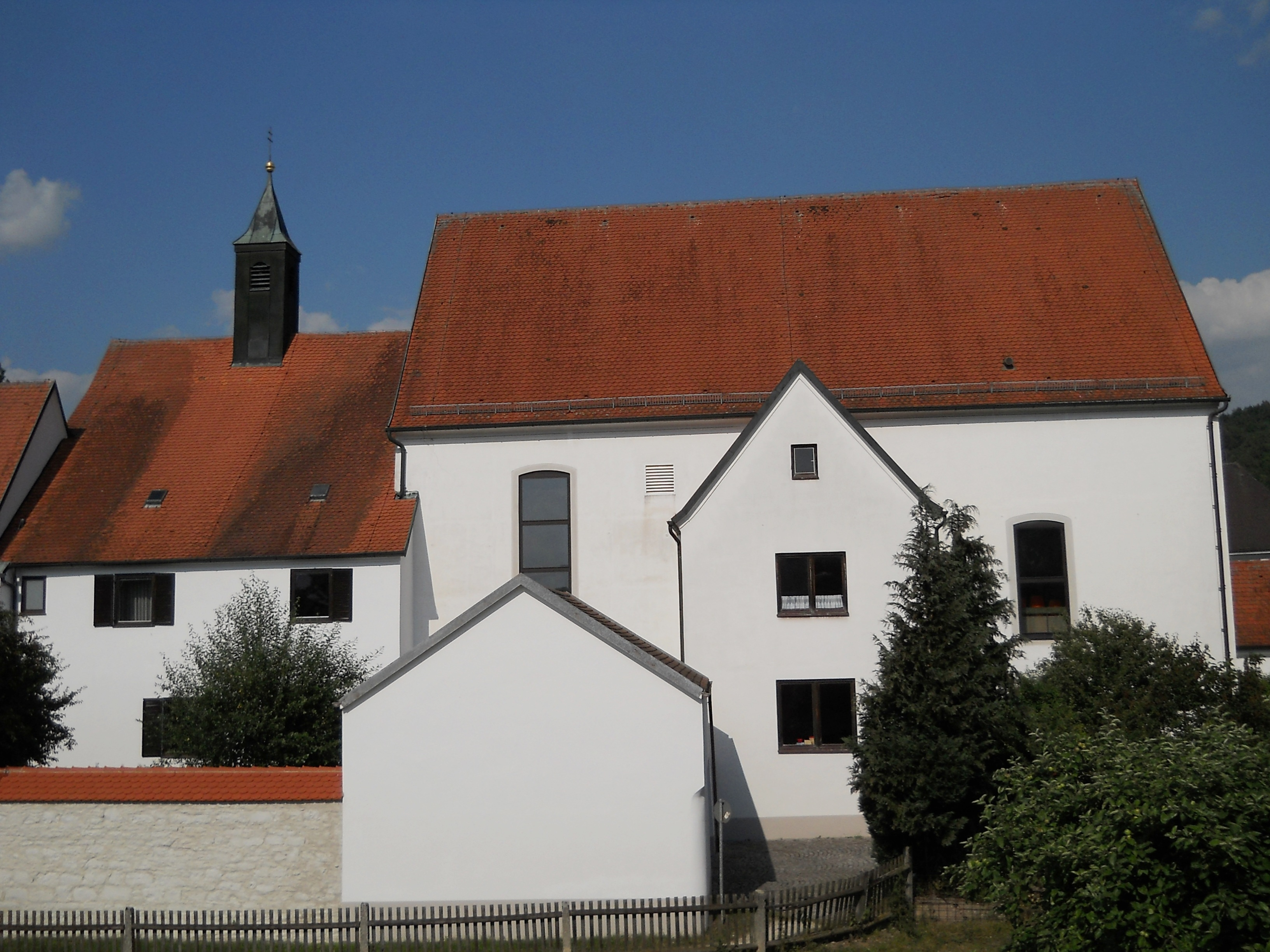 Die profanierte Klosterkirche in Berching, heute Pettenkoferhaus